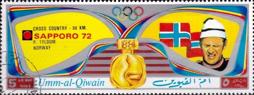 Pål Tyldum